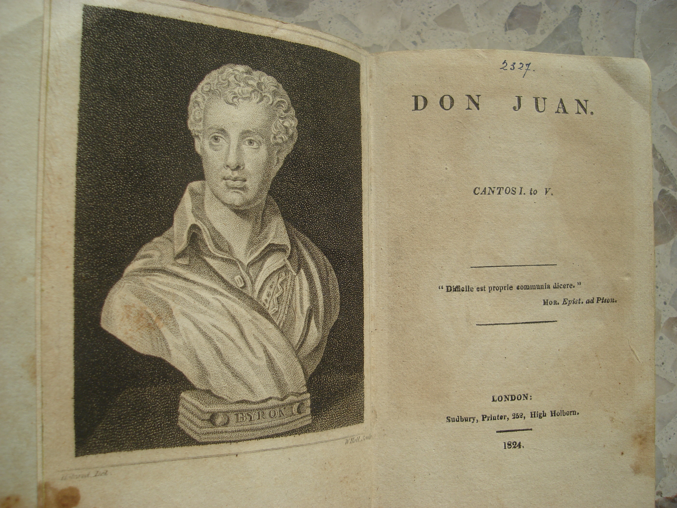 libro en inglés, volumen I, cantos I-V; volumen II, cantos VI-VIII; ambos en un sólo libro